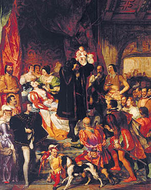 Naissance d’Henri IV (château de Pau, le 13 décembre 1553)